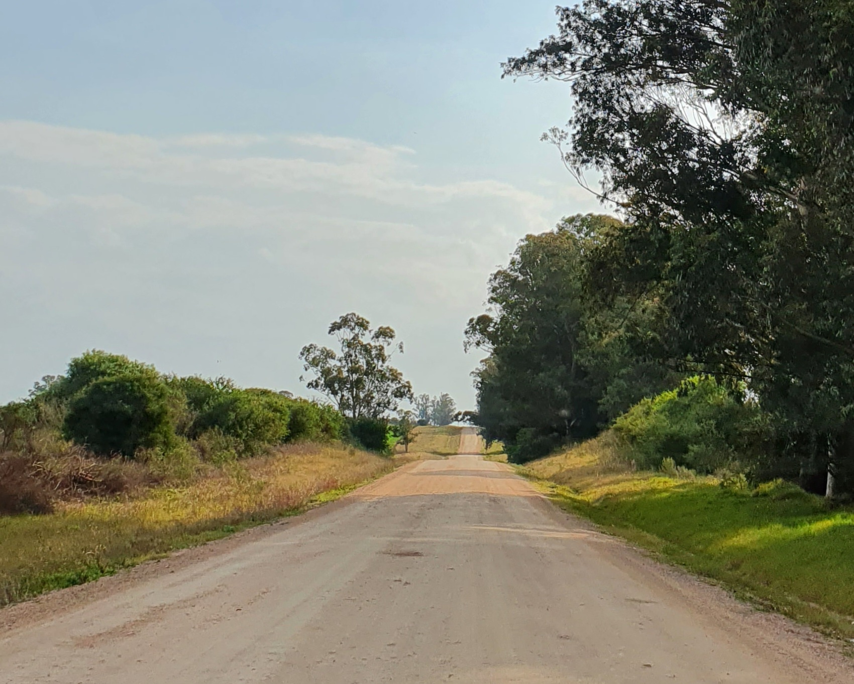 Ruta 106 hacia Miguelete. Colonia. Uruguay.